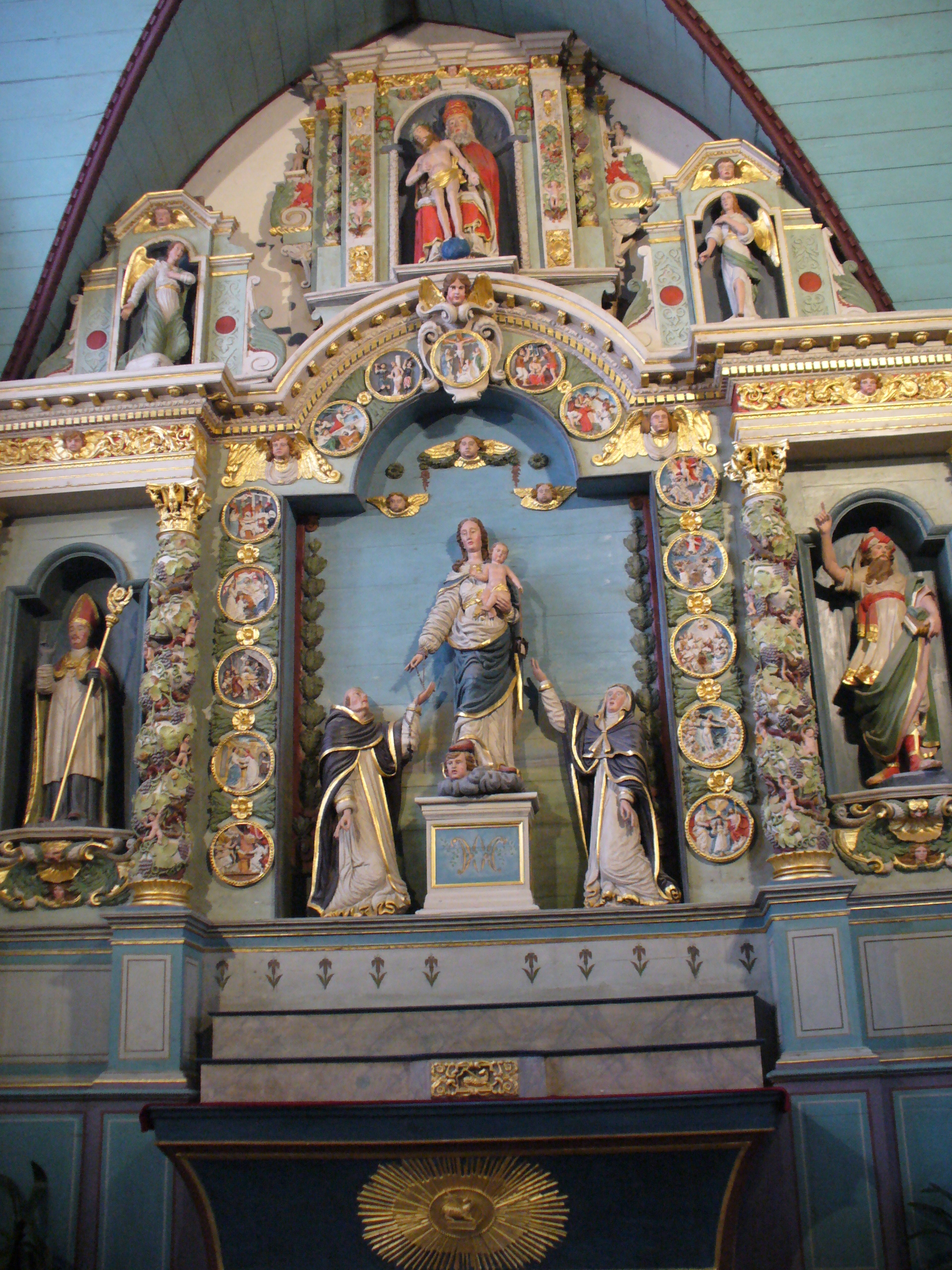 Rosenkranzaltar-Altar des Heiligen Rosenkranzes(17.Jh.)-In der Mitte Jungfrau Maria umgeben von Dominikus und Katharina von Siena umgeben von Medaillons die Geheimnisse Des Heiligen Rosenkranzes bergend-Links,Nikolaus-Rechts daneben Zacharias und darüber der Heilige Vater den Sterbenden Jesus in den Armen.